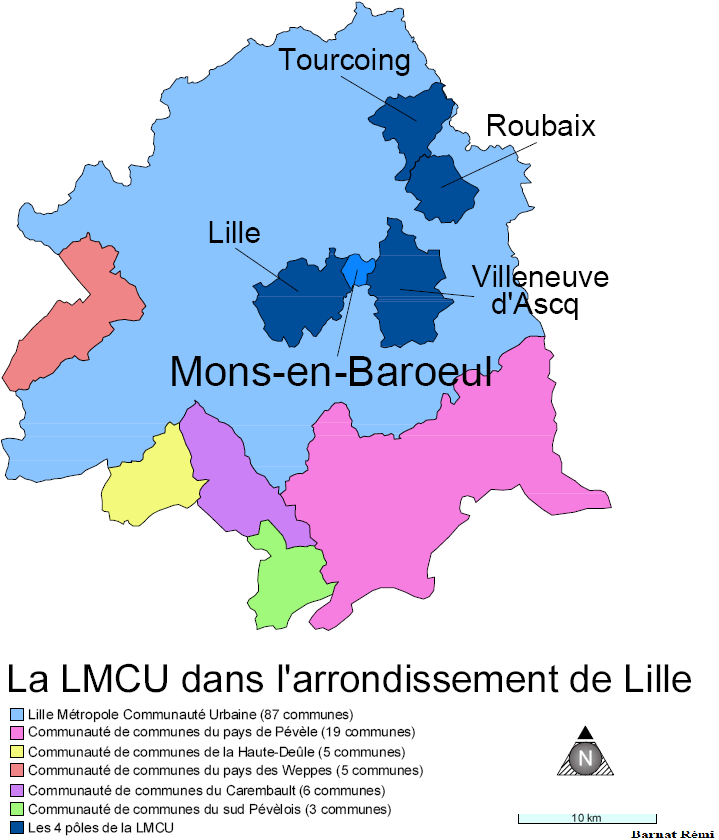 Situation geographique de Mons en Baroeul et des différentes comunautés de communes de lille